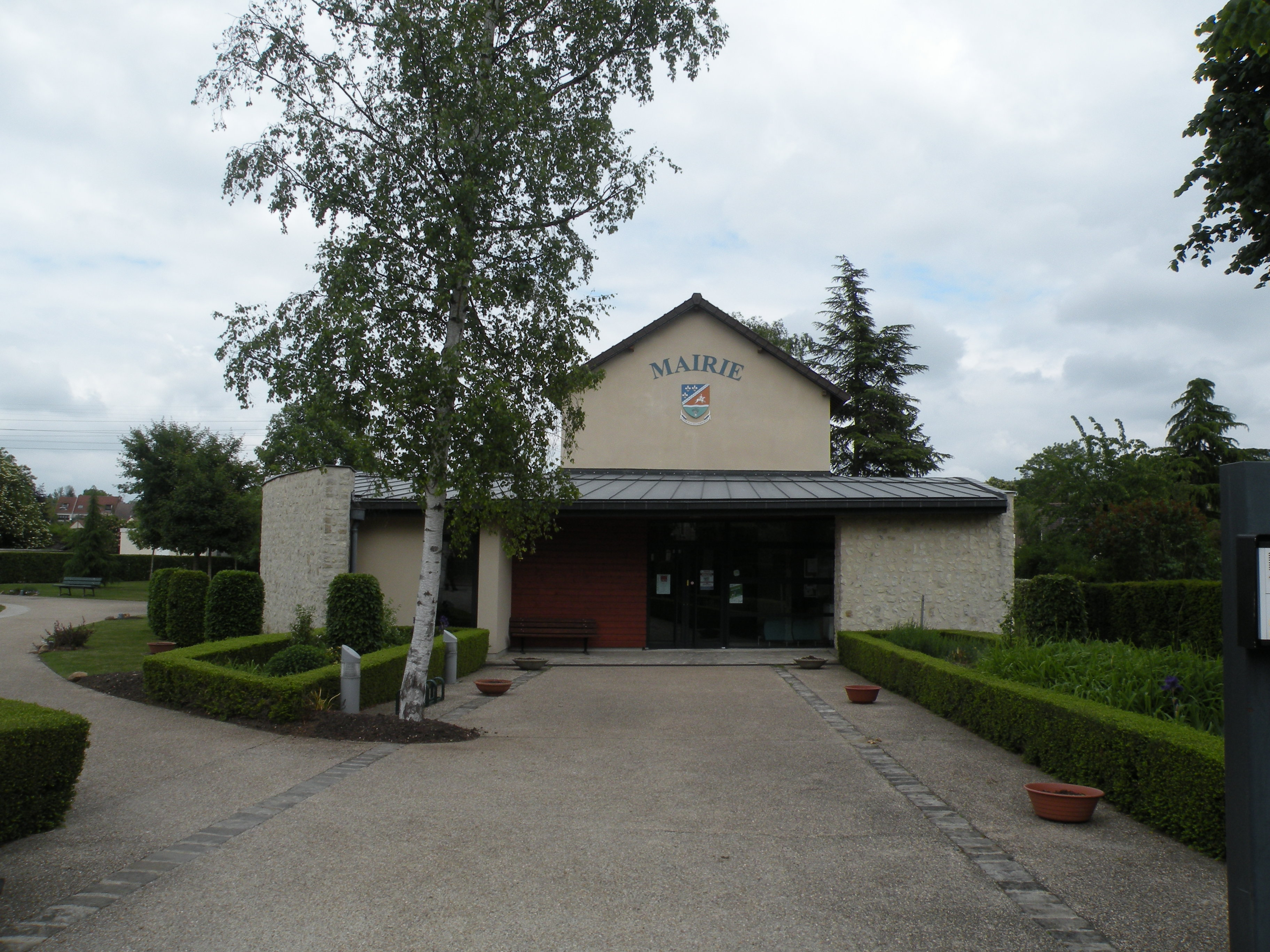 Mairie de Mours, Val d'Oise France